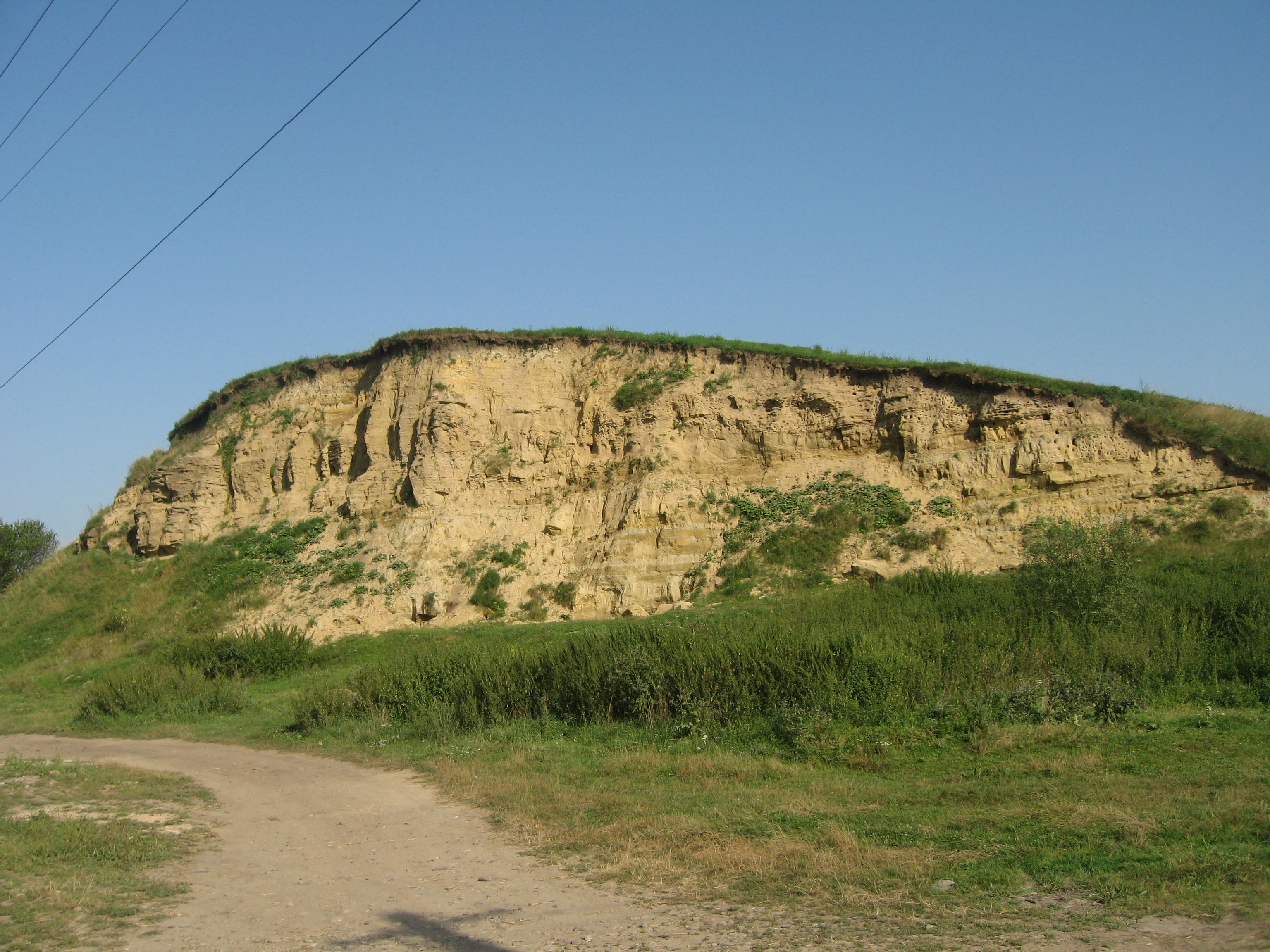 Cariera de lut din Zaharești, comuna Stroiești.